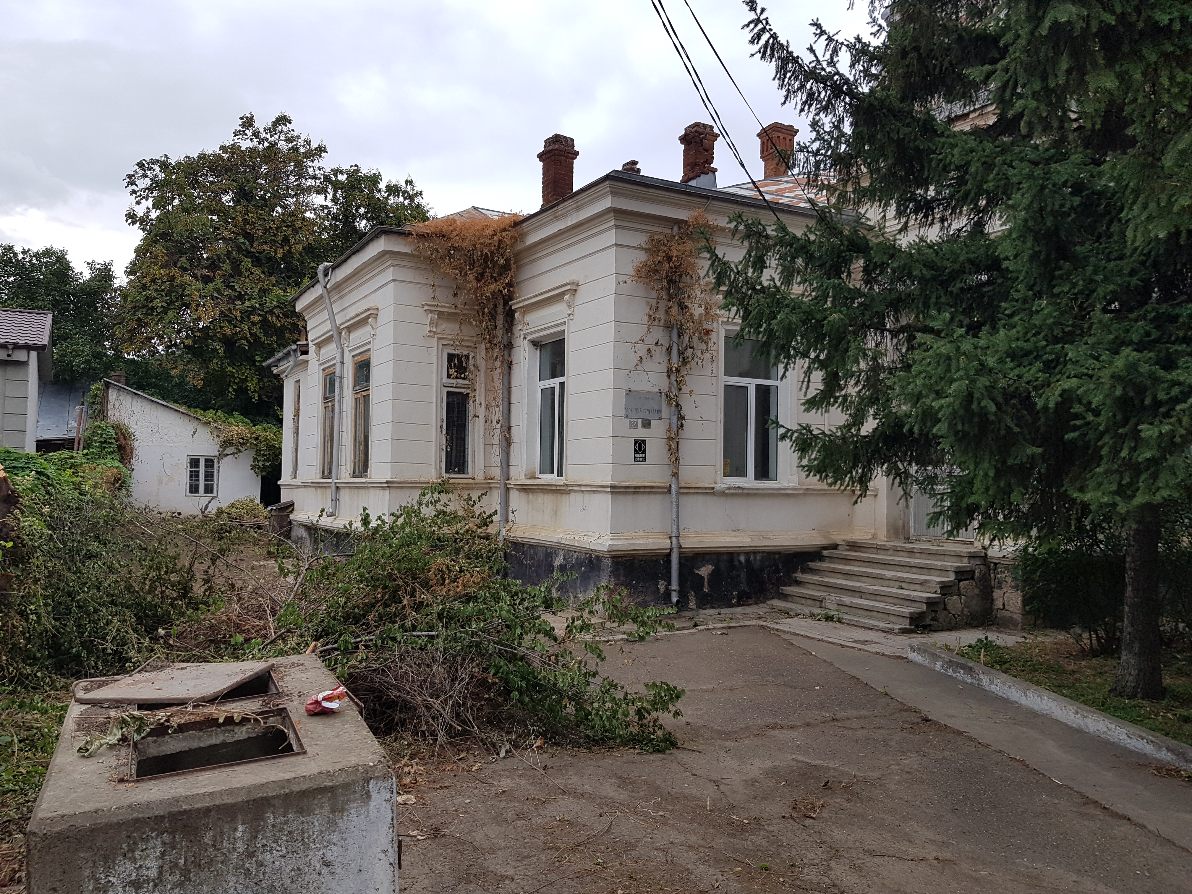 Casa Curețeanu